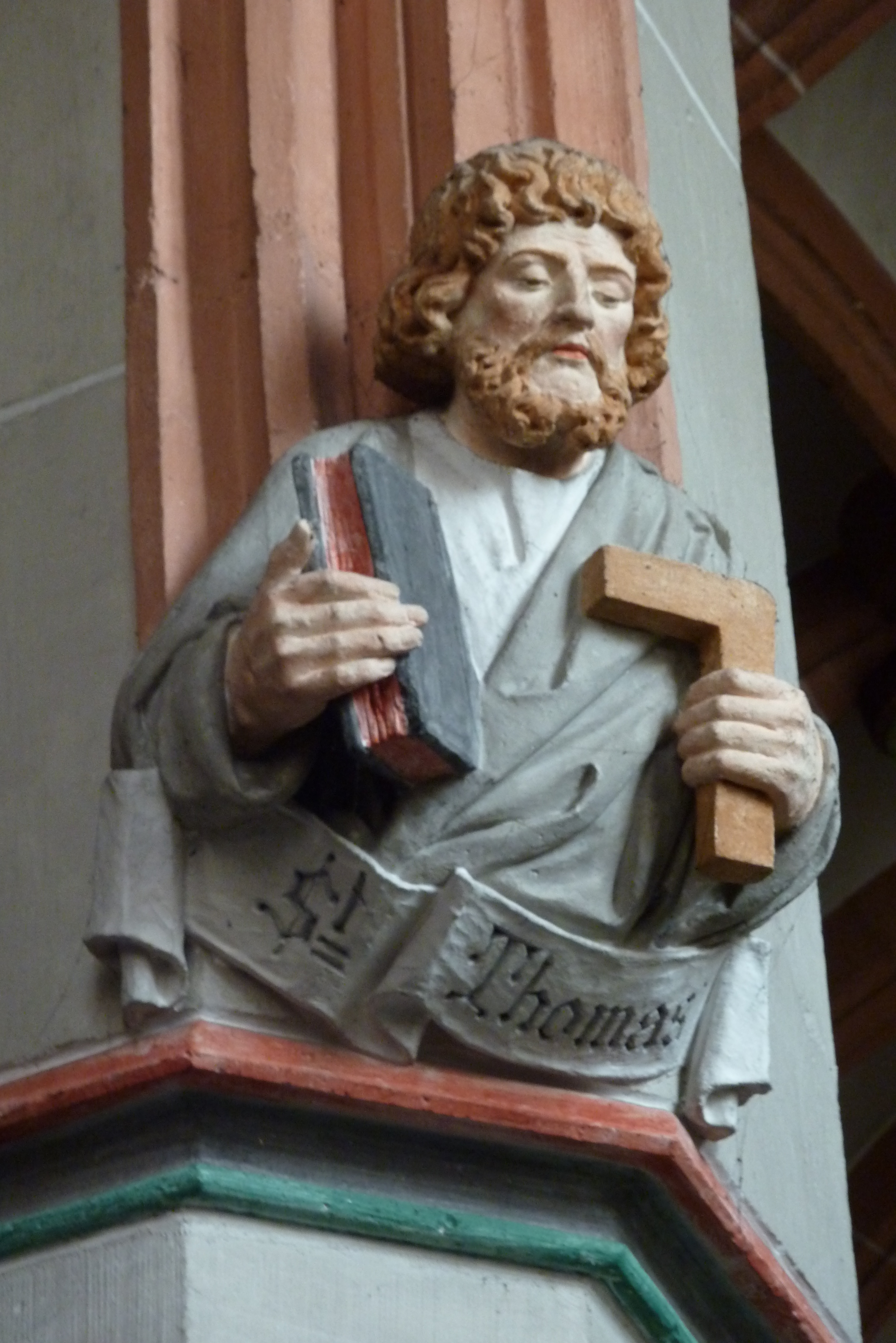 Katholische Pfarrkirche St. Philippus und Jakobus in Kempenich, Konsolfigur des Apostels Thomas